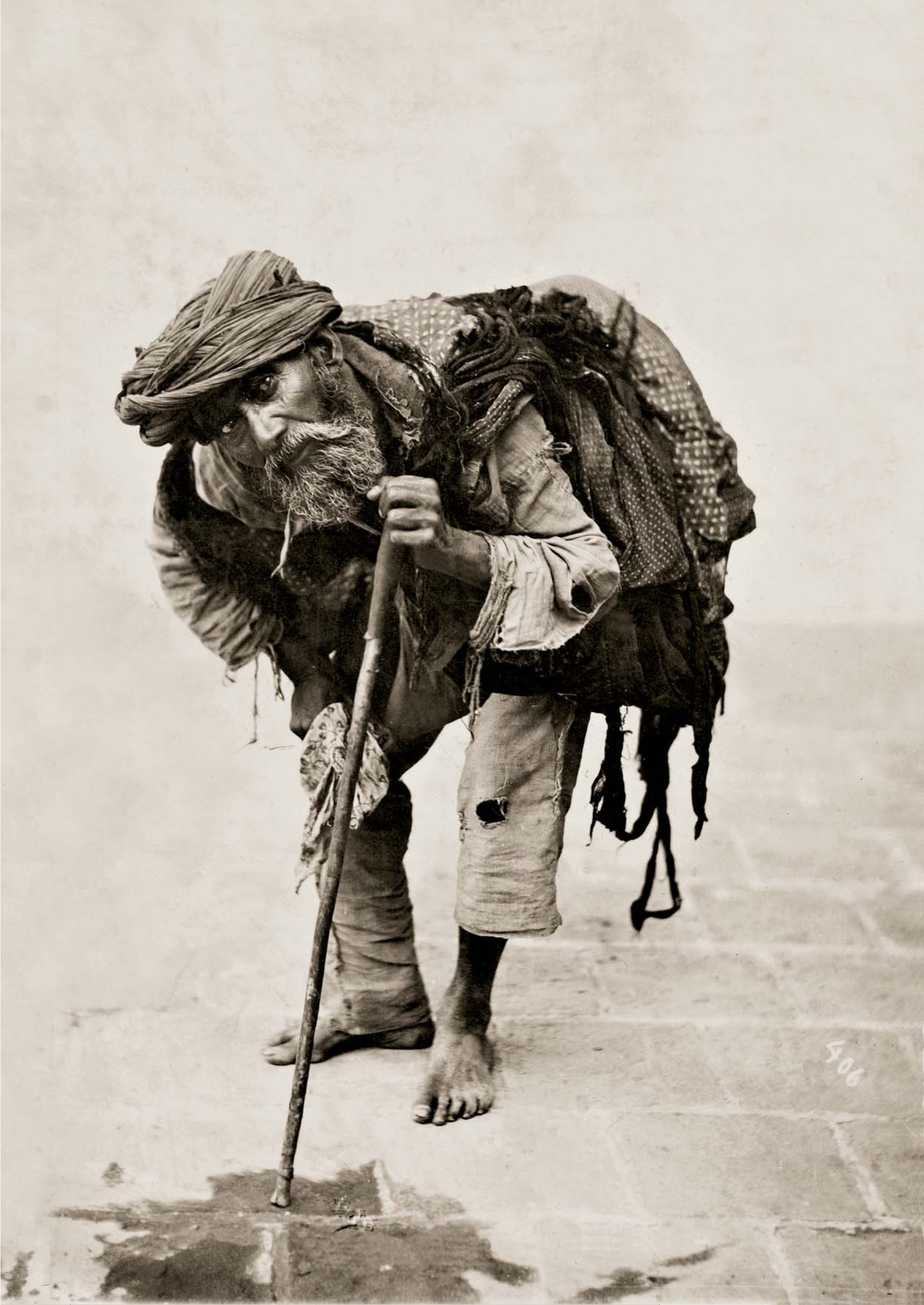 Bettler in Teheran. Ein Bild von Antoin Sevruguin. Um 1880.